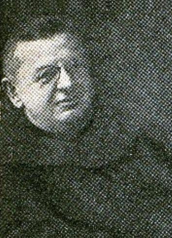 Expeditus Schmidt als Spielleiter des Vilsbiburger Liebfrauenfestspiels